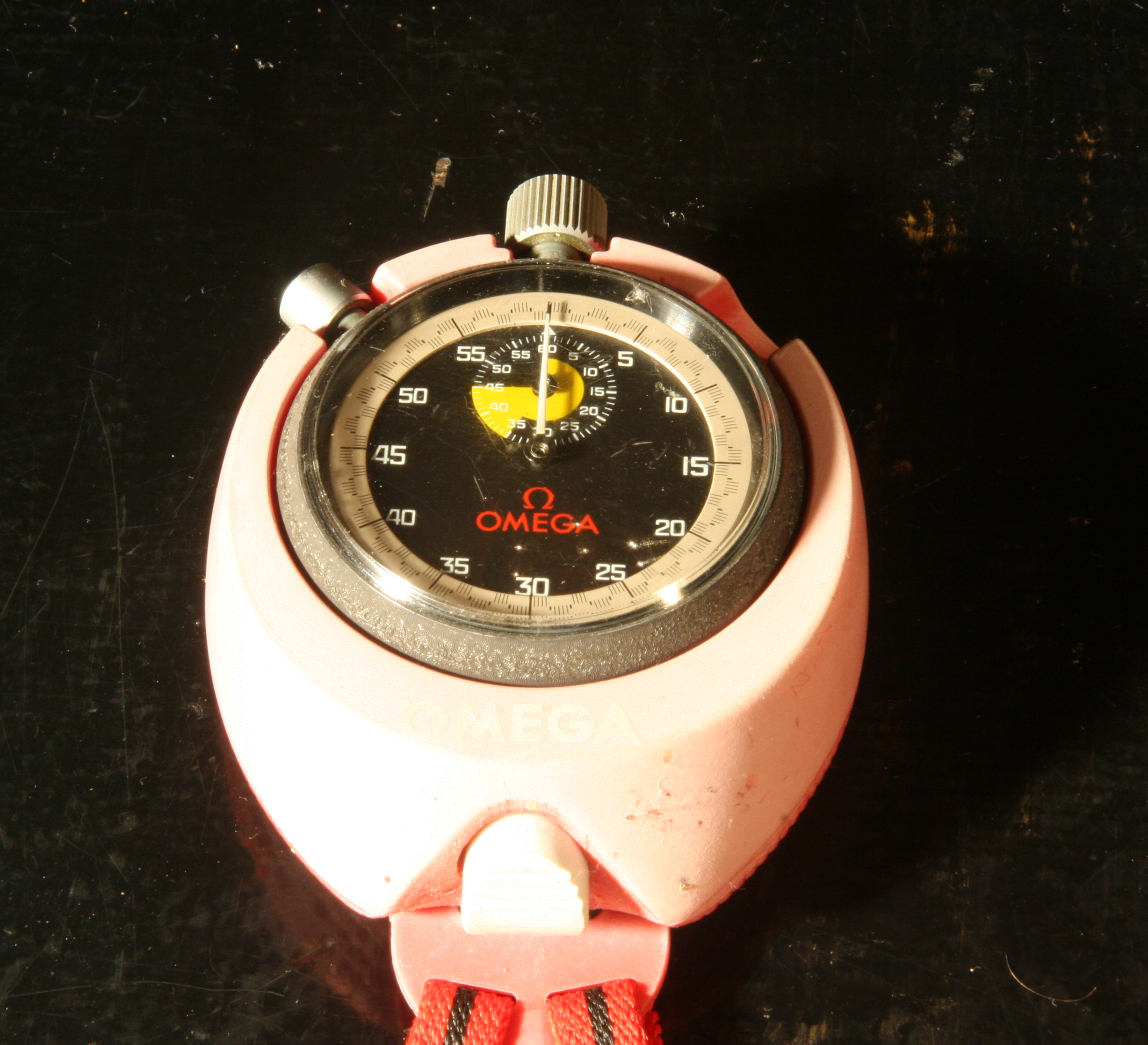 Håndholdt mekanisk stopur.